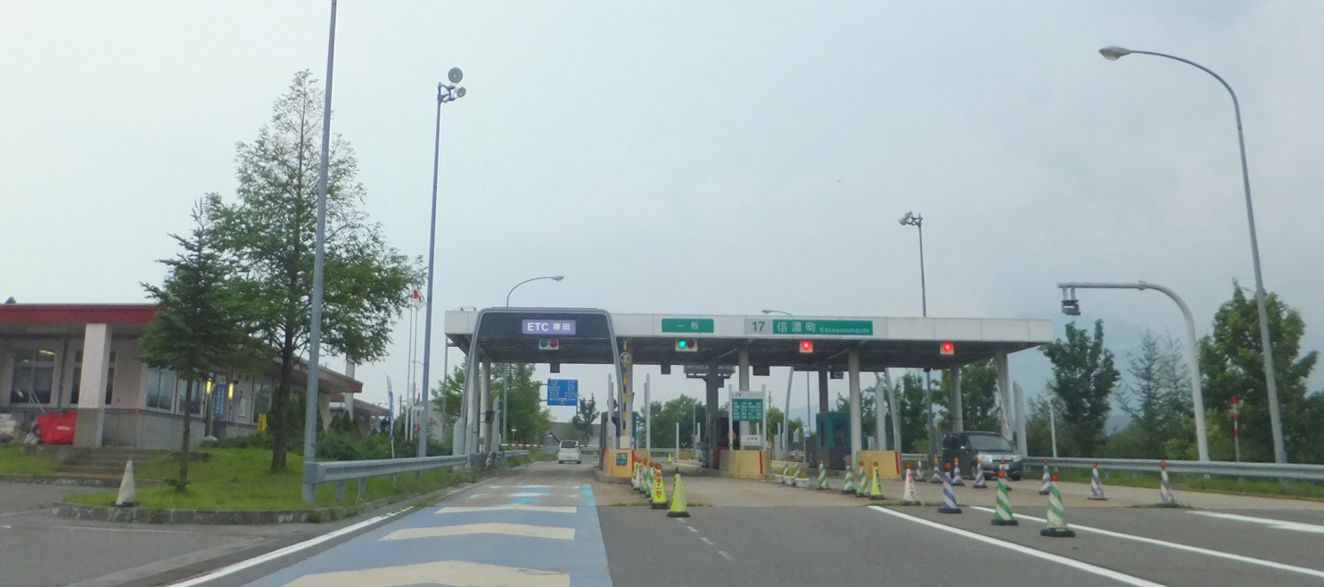 信濃町インターチェンジ